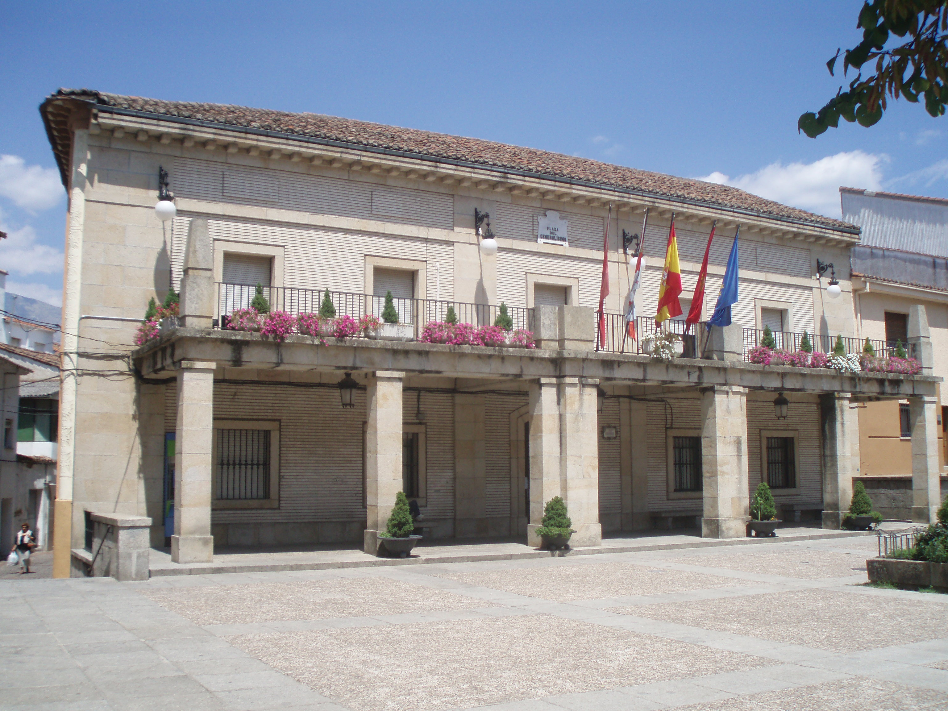 Ayuntamiento de la localidad de Arenas de San Pedro, perteneciente a la Provincia de Ávila. (España)